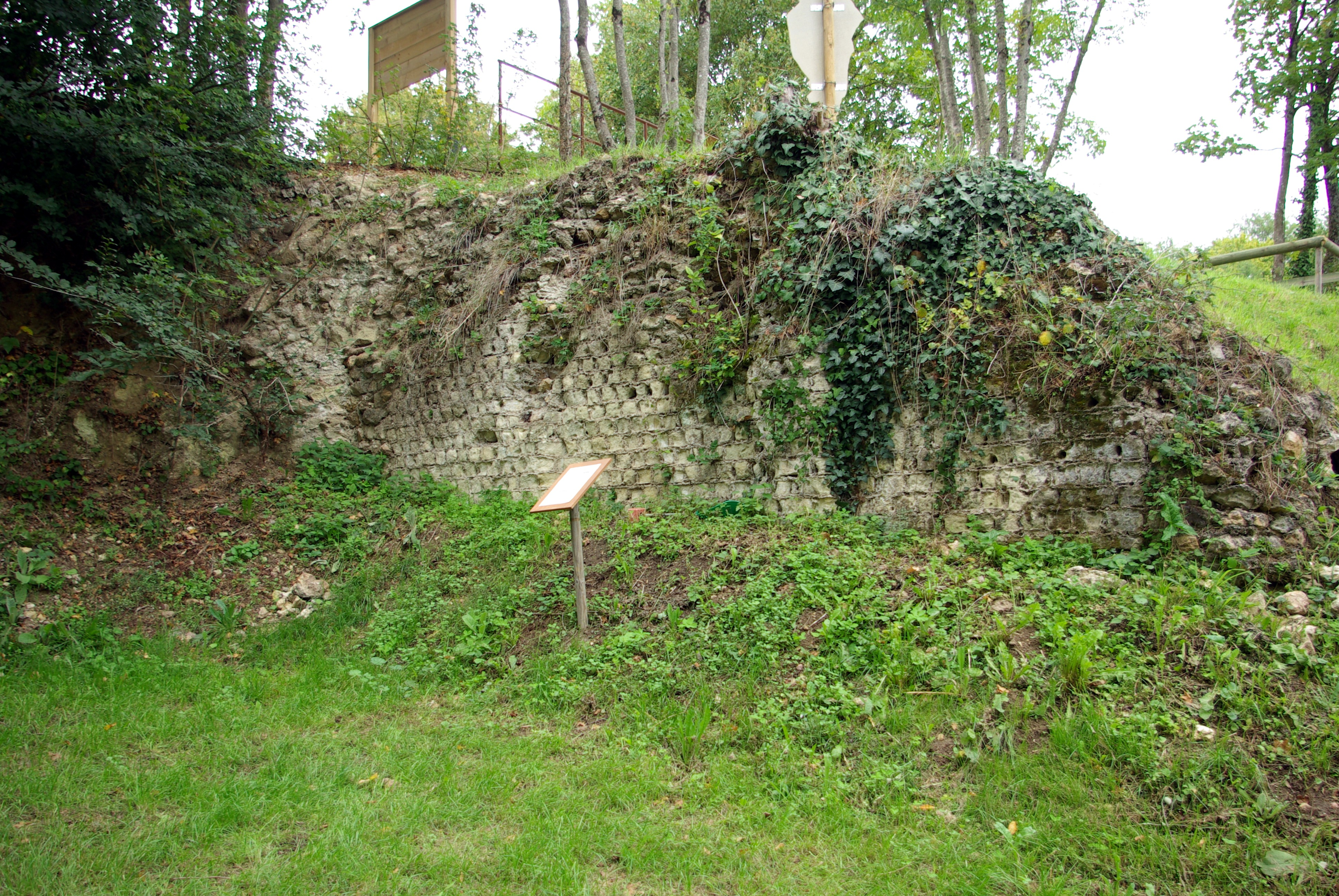 Mur antique maintenant la terrasse au nord de la pile romaine de Cinq-Mars-la-Pile.